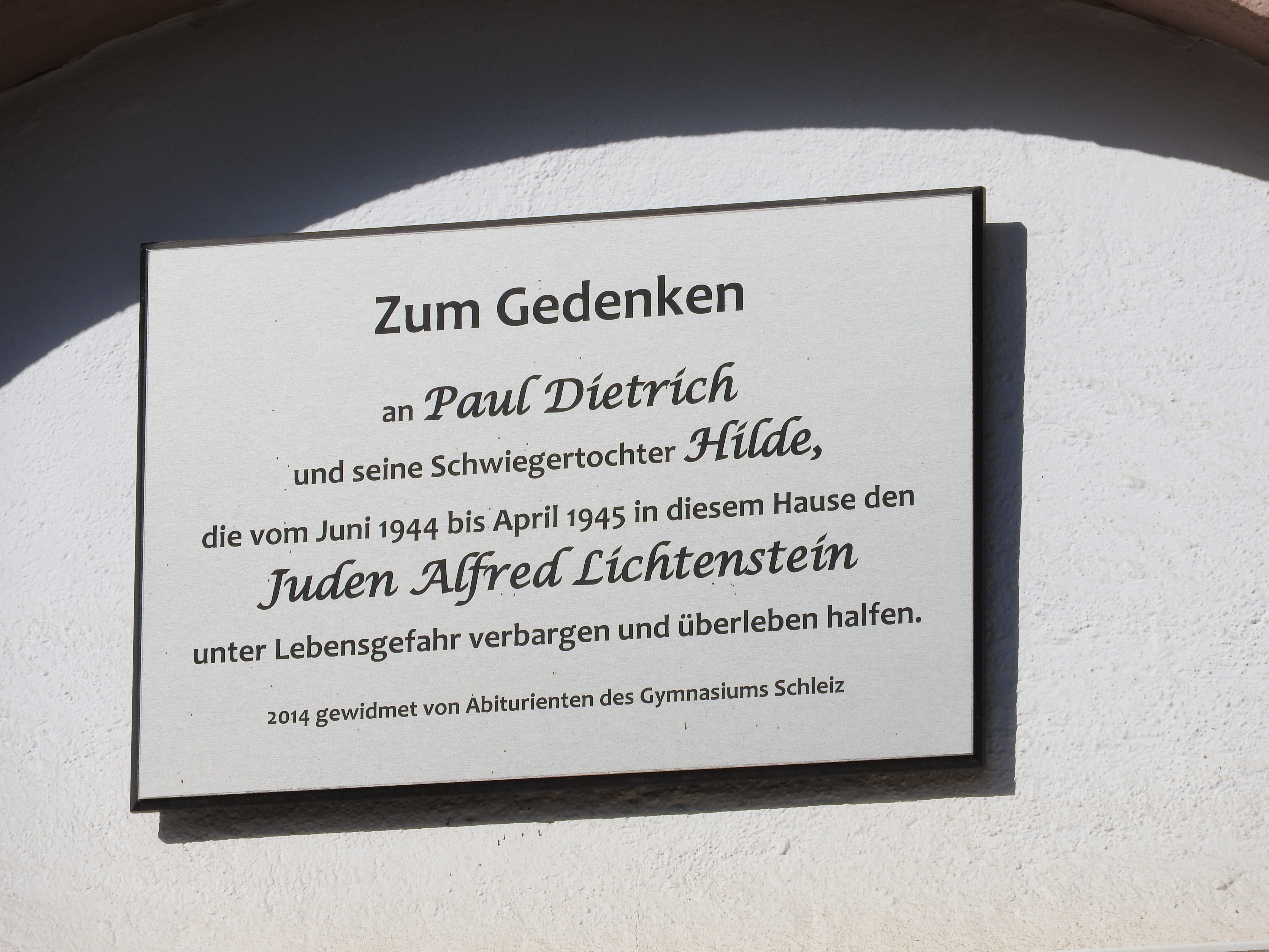 Tafel an Haus in Oettersdorf, Thüringen